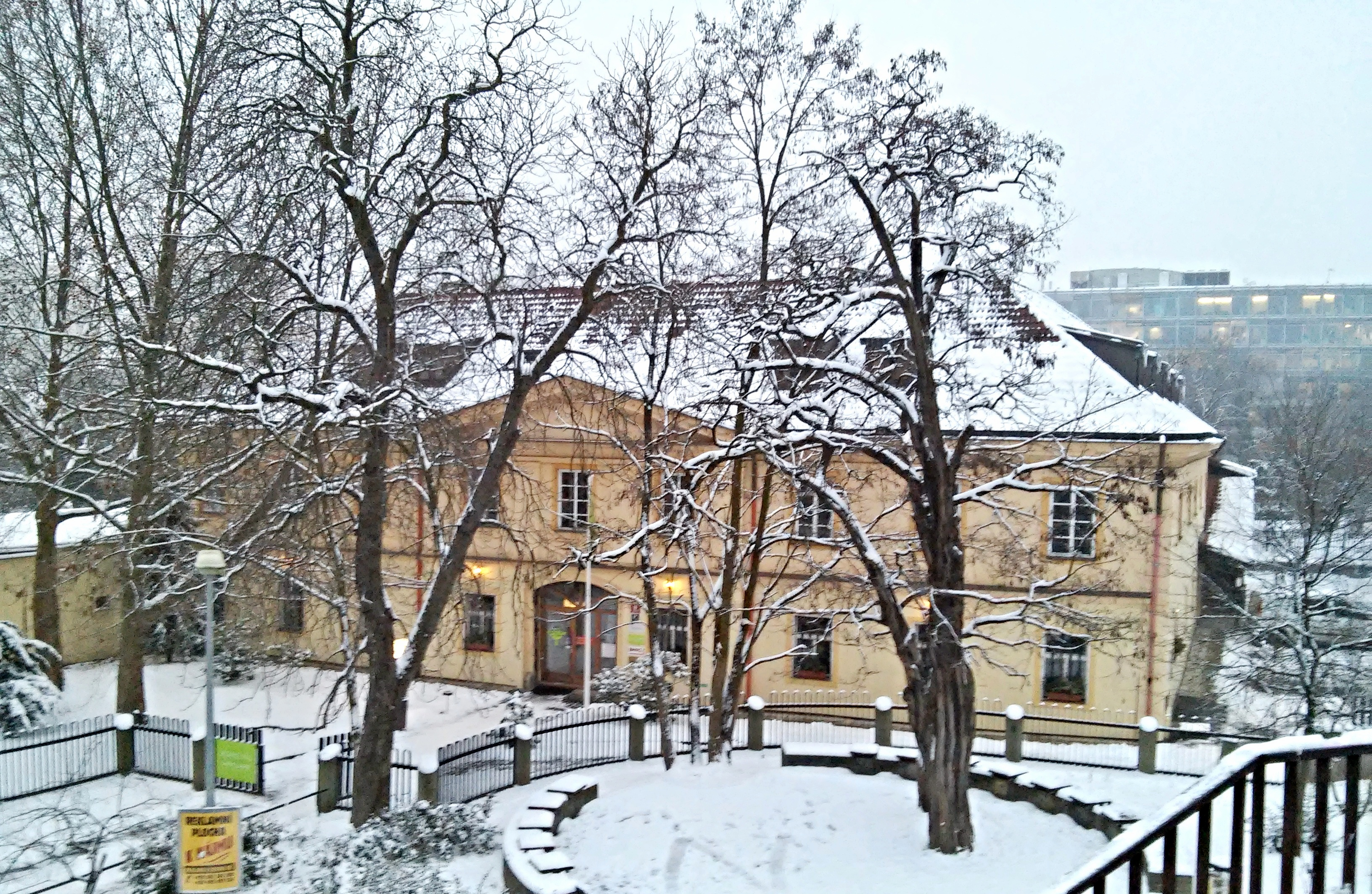 Strašnice, Bečvářův dvůr